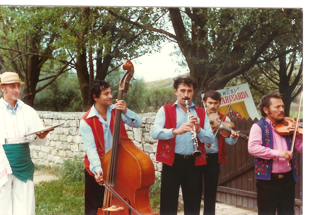 Pusztamuseker